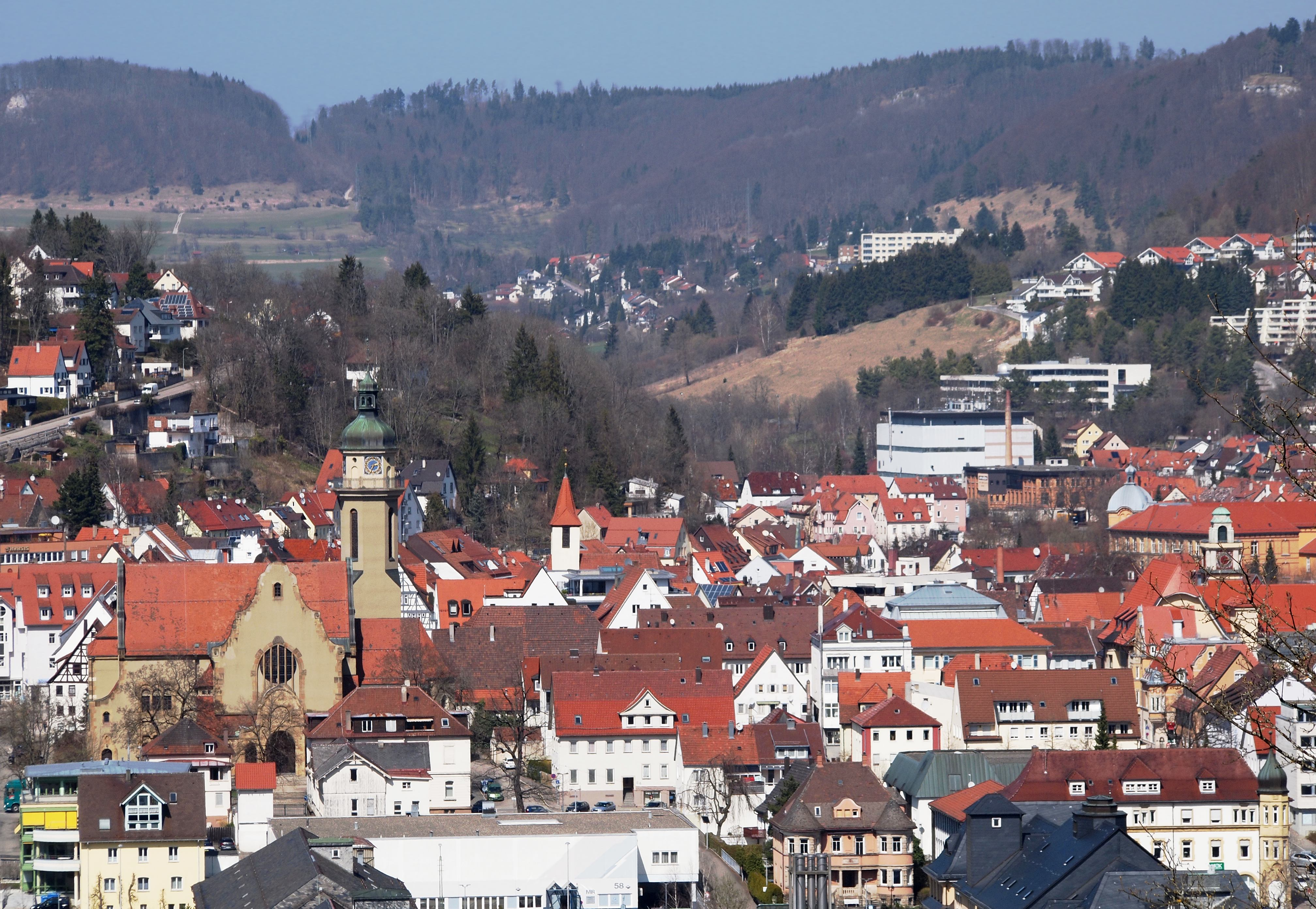 Ebingen, von der Riedhalde gesehen